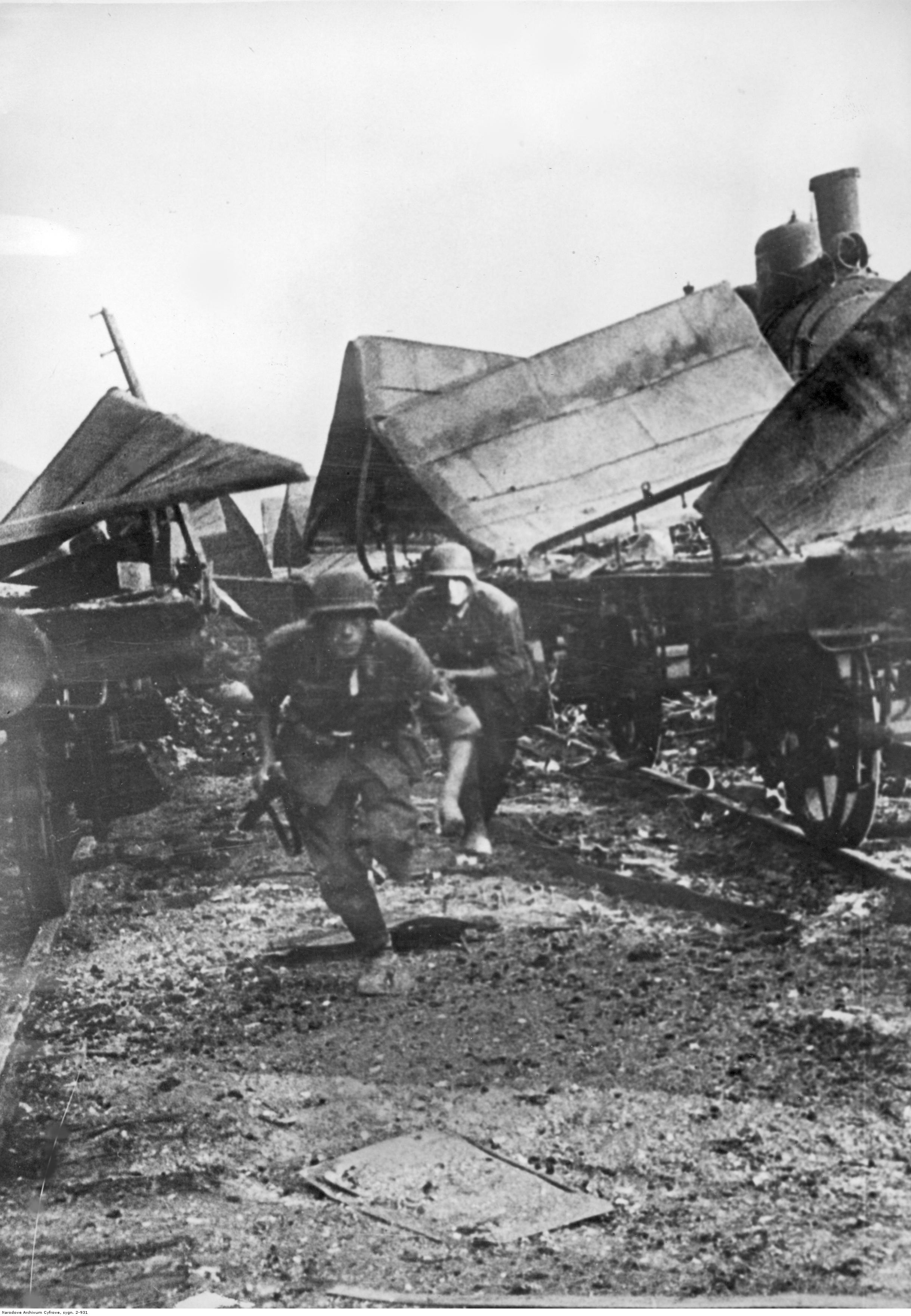 Atak wojsk niemieckich na pociąg wojskowy na trasie Moskwa-Smoleńsk. Dwaj żołnierze biegną wzdłuż zniszczonych wagonów.